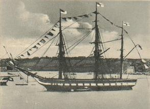 Das Bild zeigt die Fregatte SMS Thetis um 1855